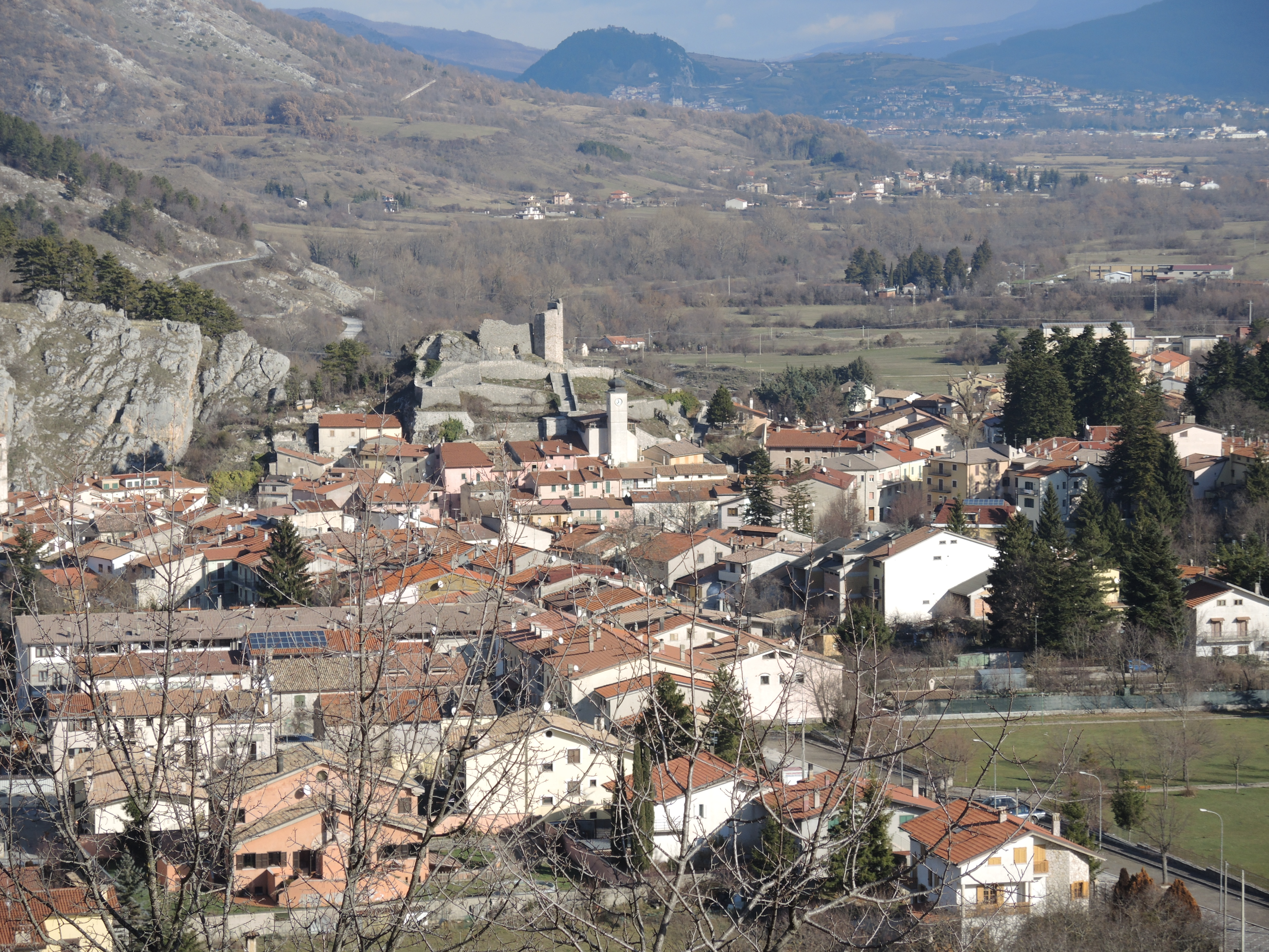 Alfedena: Castello